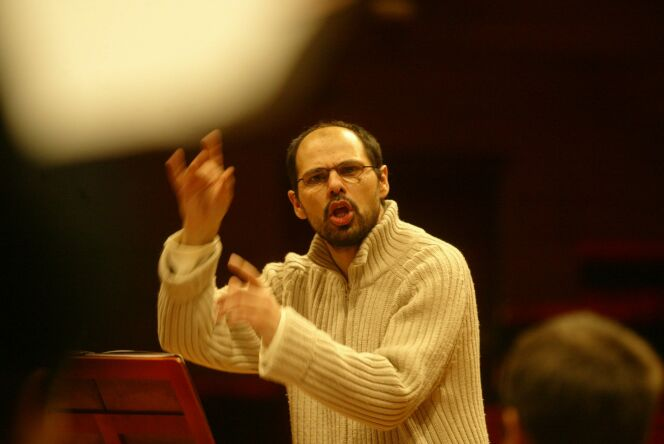 2004-03-04 Canco Lopez Auditorio de Galicia